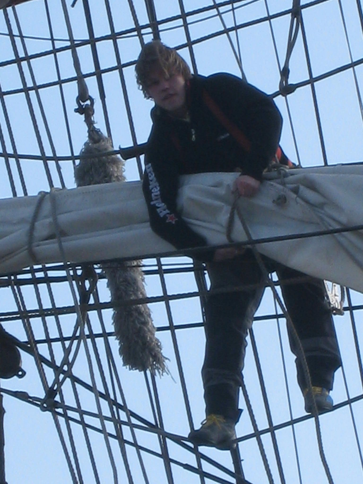 Het reven van een zeil door de bemanning